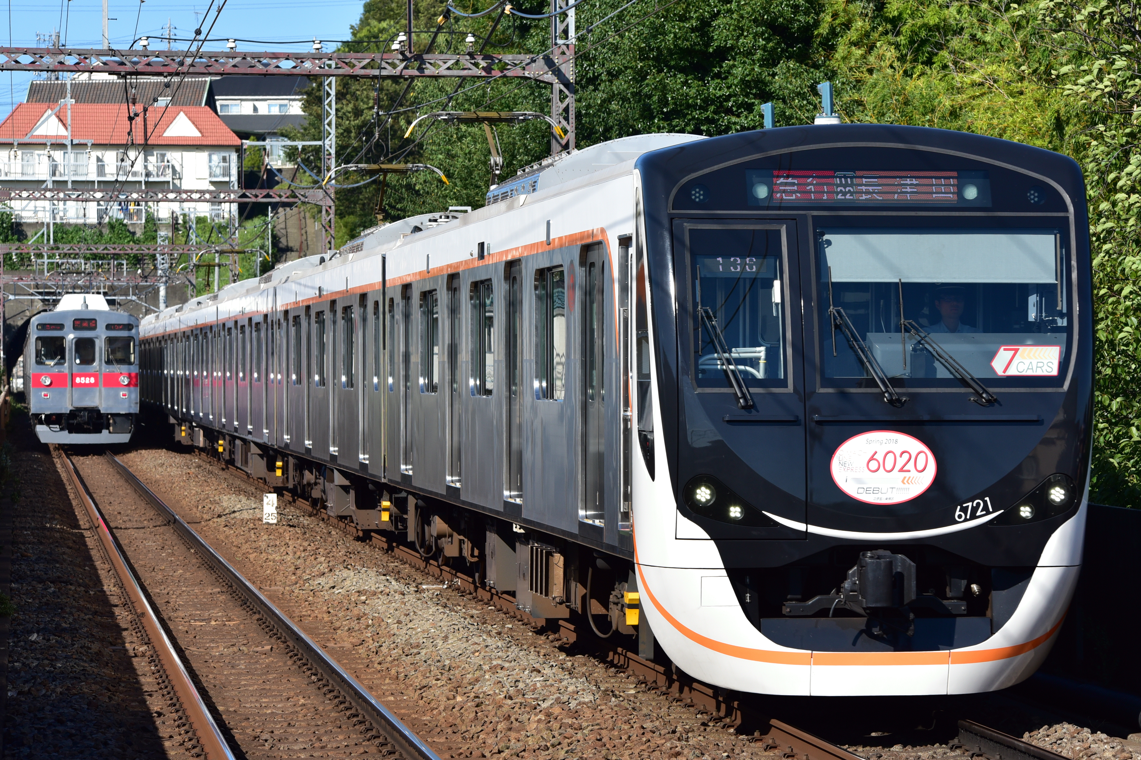 田園都市線6020系。田奈駅。 Nikon D750